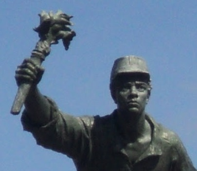 Estatua de Juan Santamaría (detalle) — Alajuela.